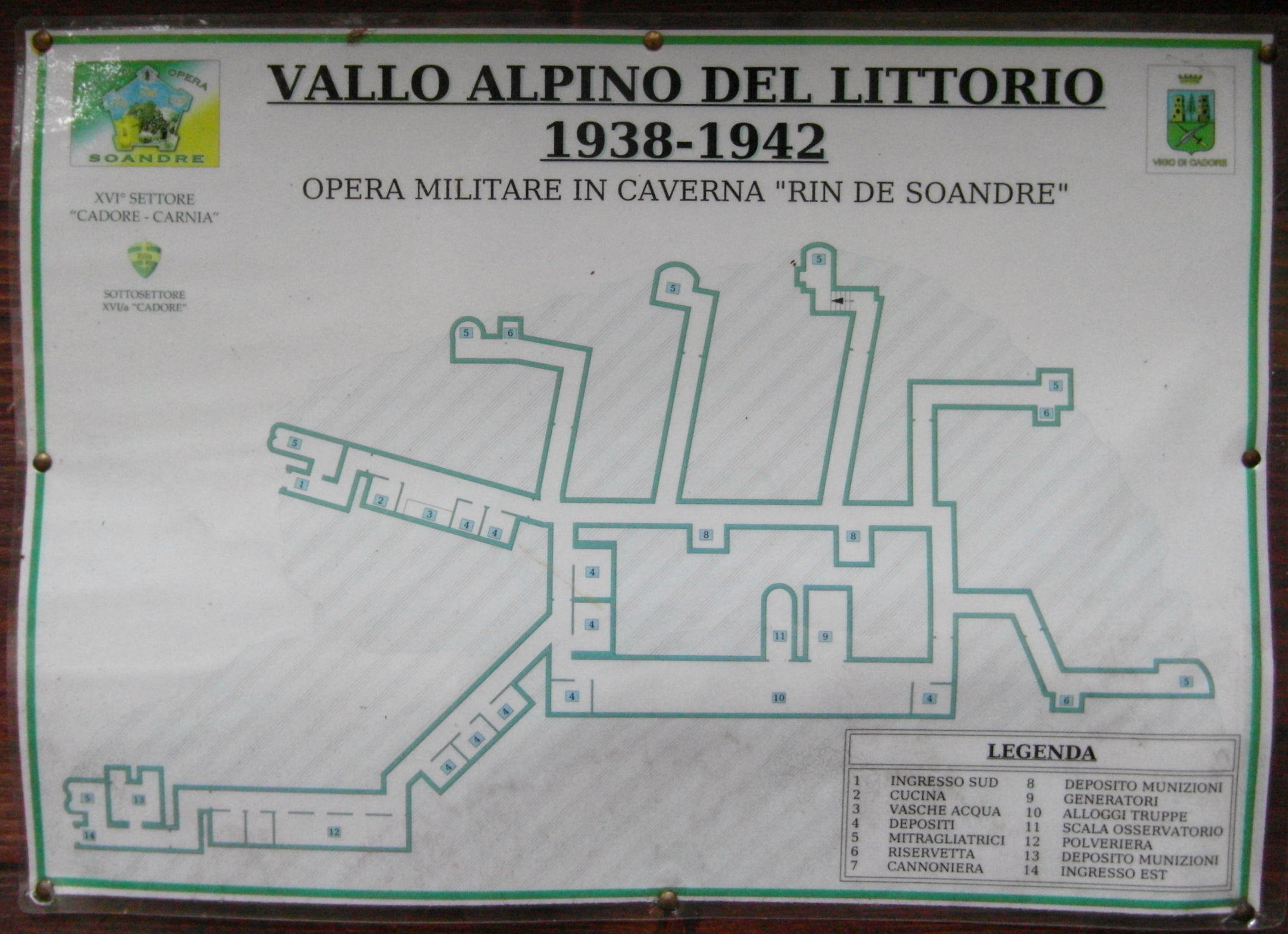 Opera 9 bis Cima Gogna - Piantina